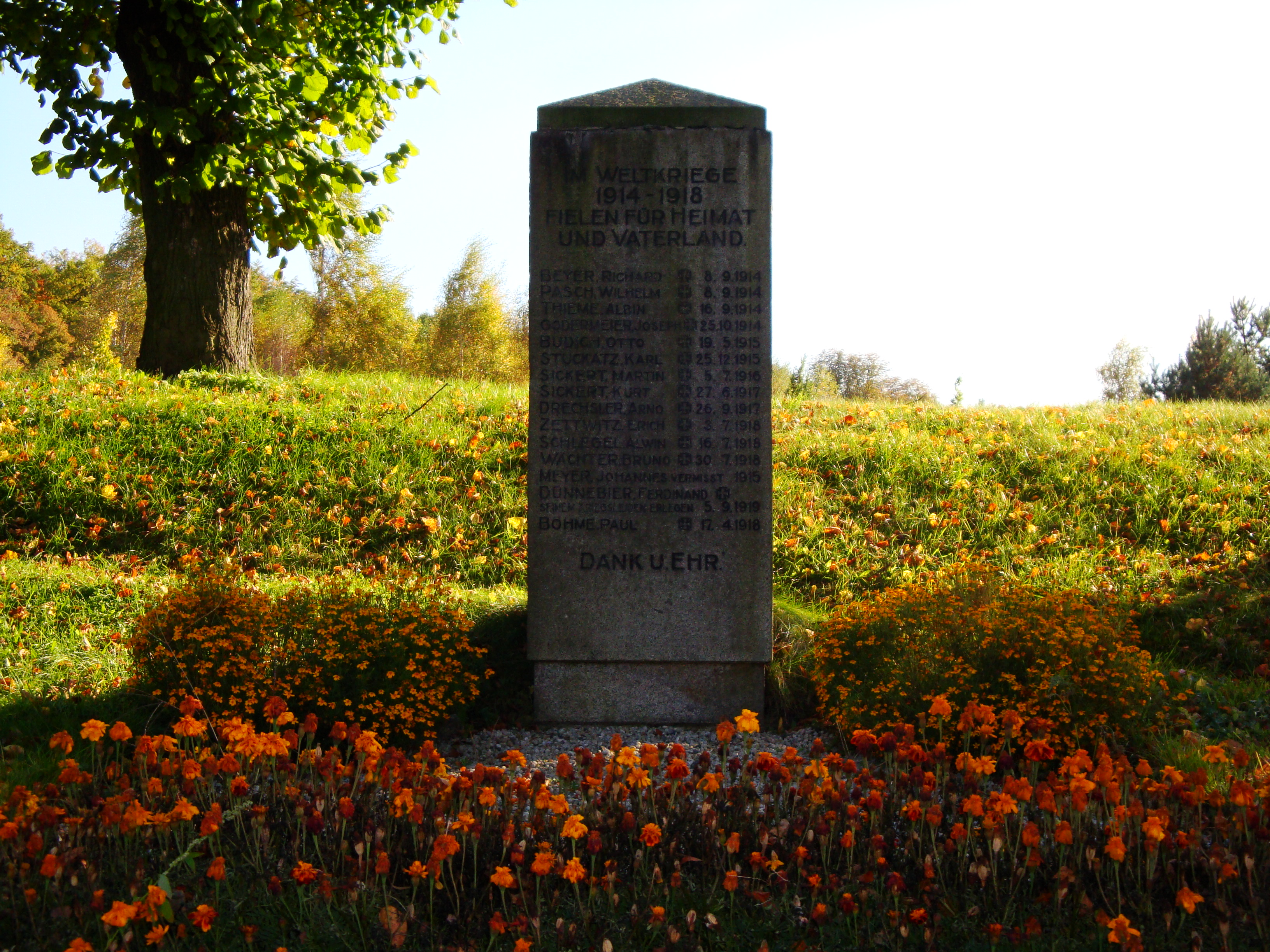 Kriegerdenkmal für die Gefallenen des Ersten Weltkrieges in Königsbrück